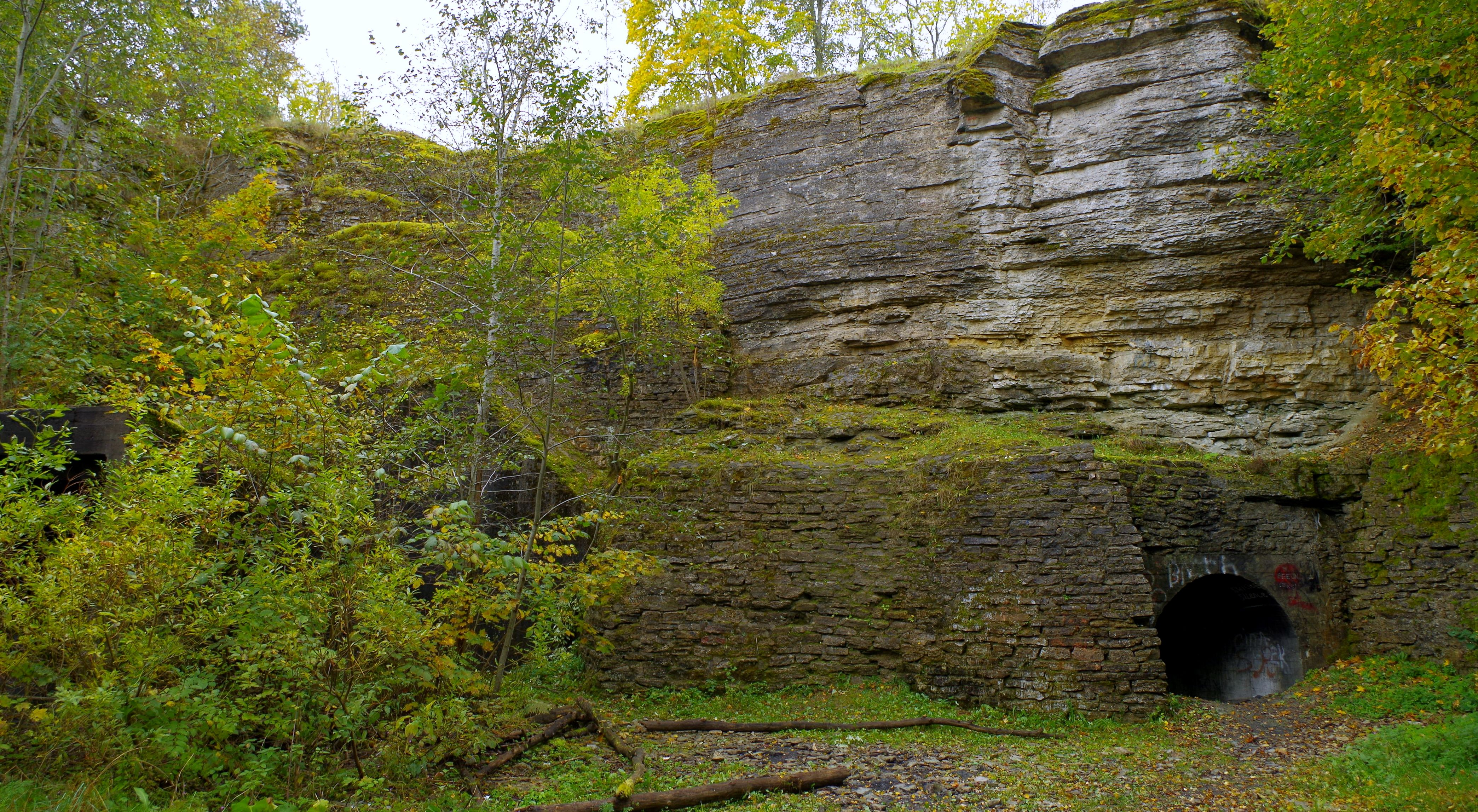 Peeter Suure merekindluse laskemoonalaod, 1917. a